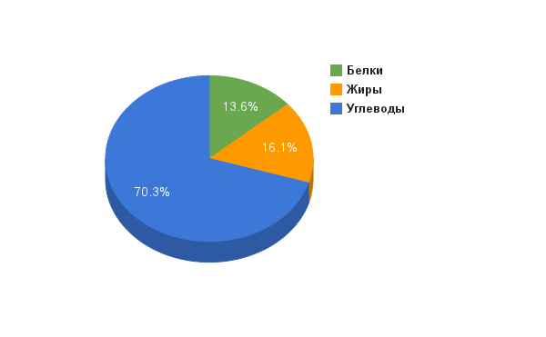 Средние нормы потребление веществ в процентах